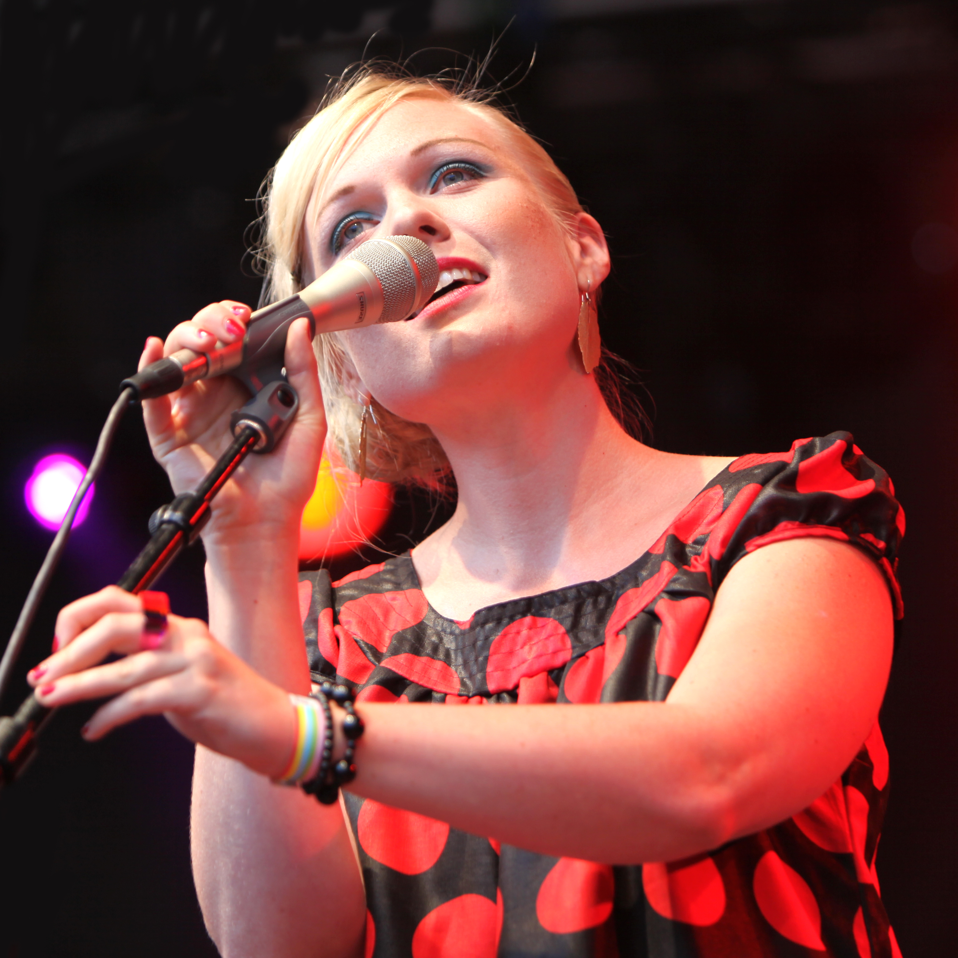 Josefine Lindstrand at Stockholm Jazz Fest 2009